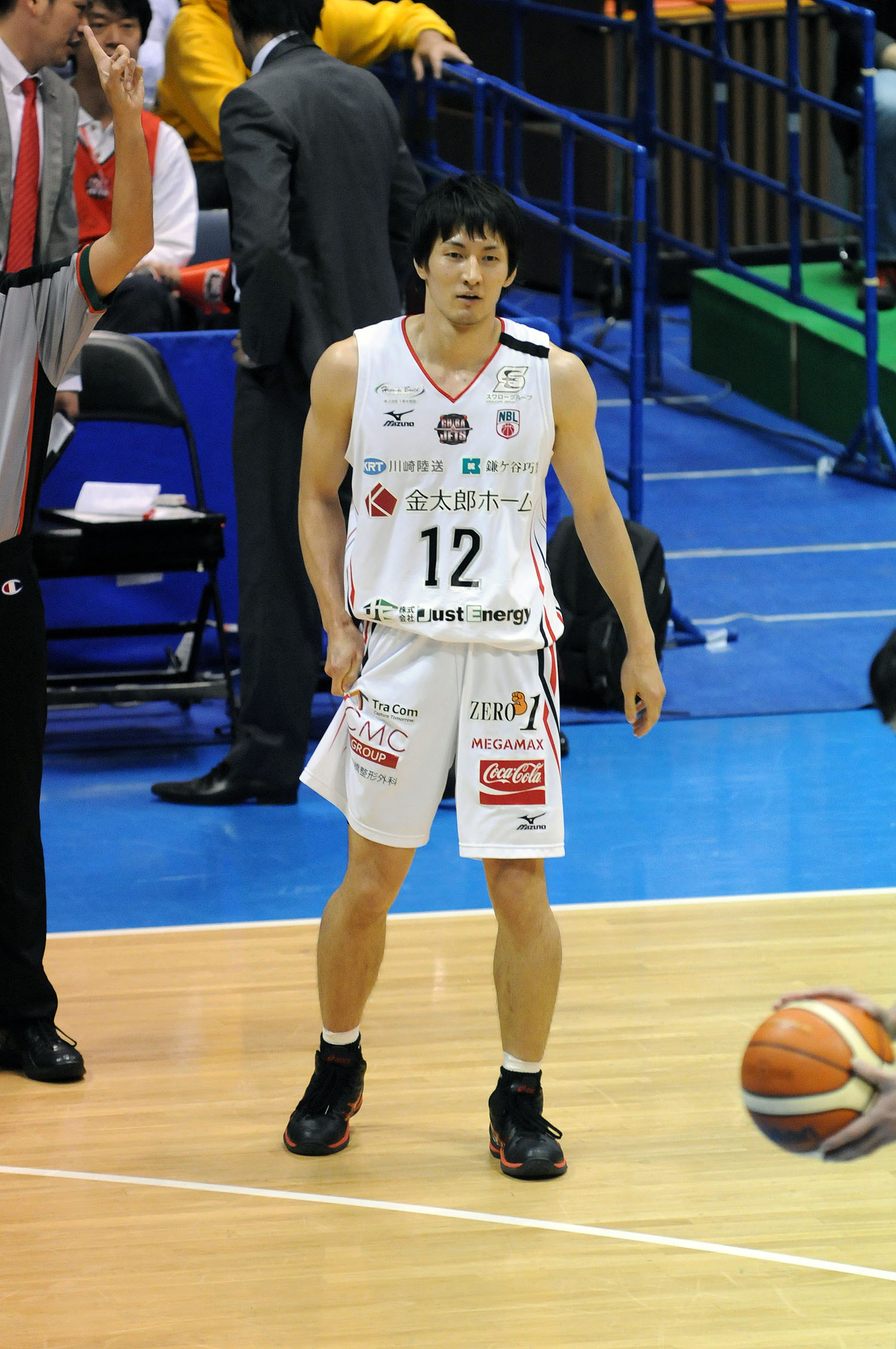 千葉ジェッツ、岡田優介選手。国立代々木競技場第二体育館で。